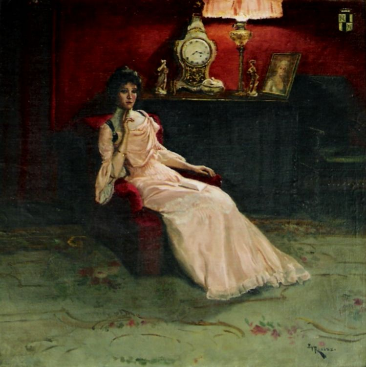 Gemälde einer jungen Patrizierin aus der Familie Pfyffer v. Heidegg zur Zeit der Belle Epoque (Privatbesitz